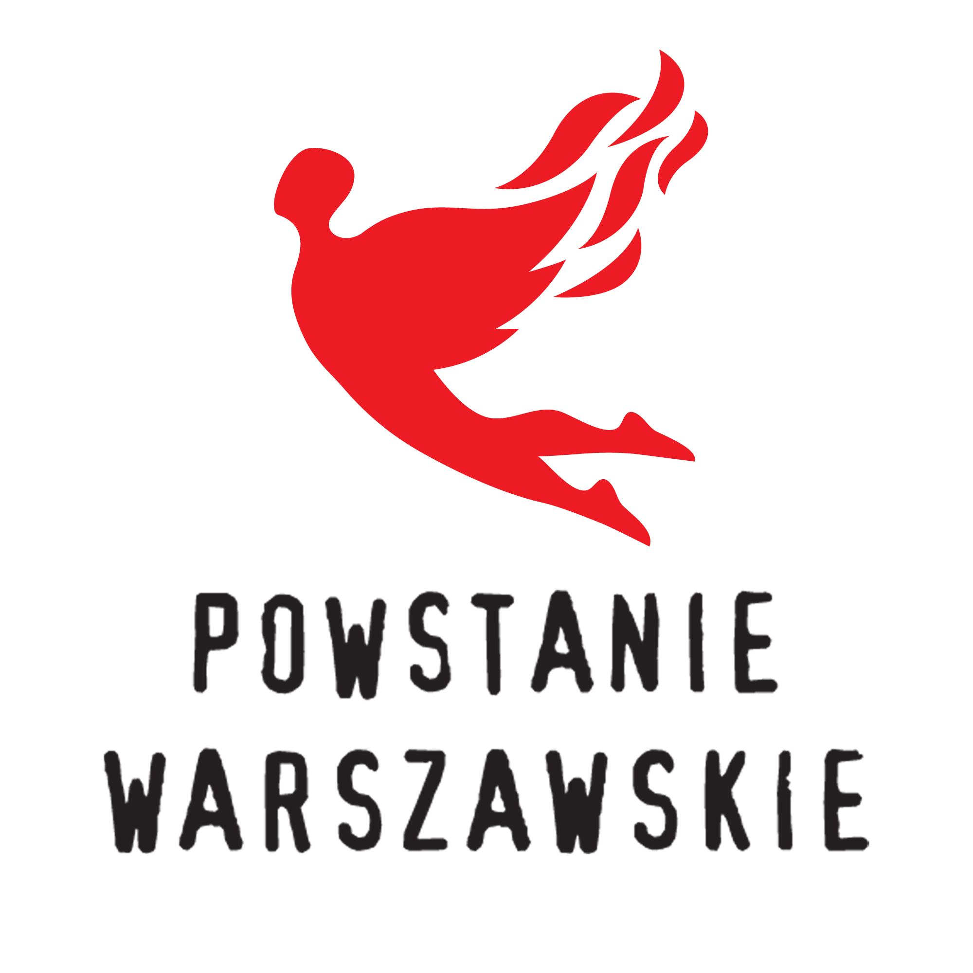 Materiały Muzeum Powstania Warszawskiego